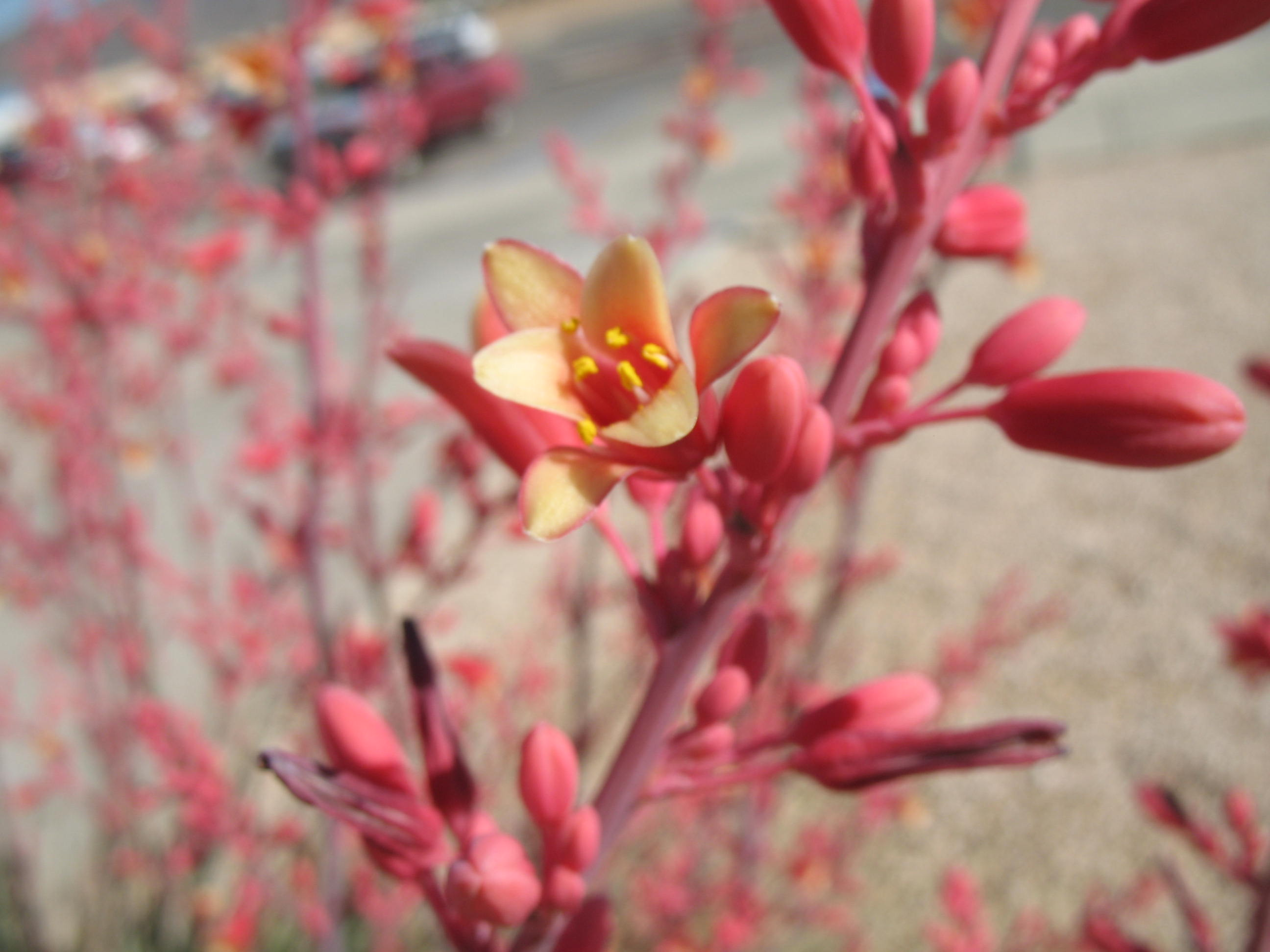 Blütenansicht